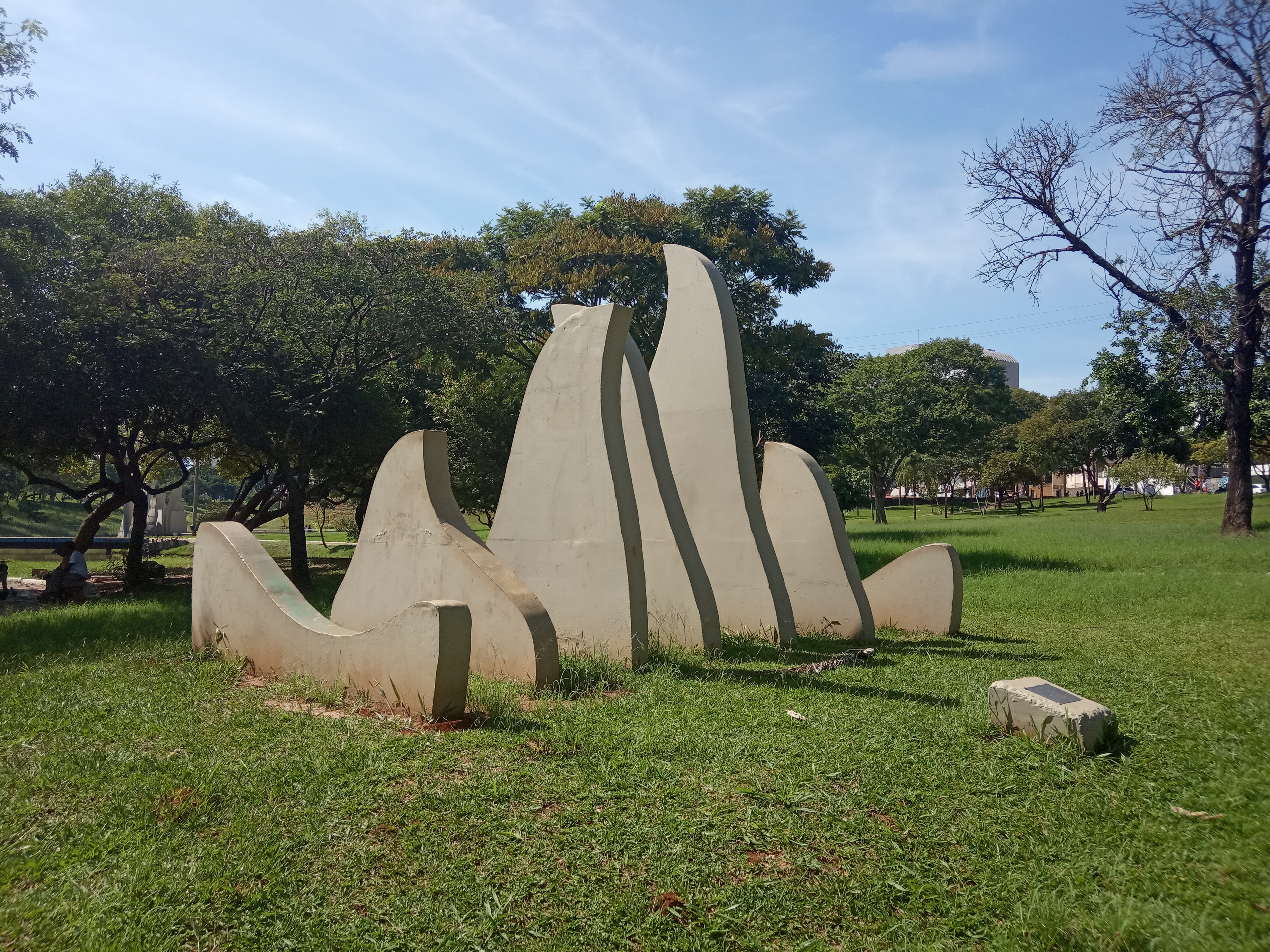 Vista do monumento Piro Agogo, em homenagem aos Jogos Olímpicos e Paralímpicos de 2016, localizado no Parque Vitória Régia, em Bauru (São Paulo).